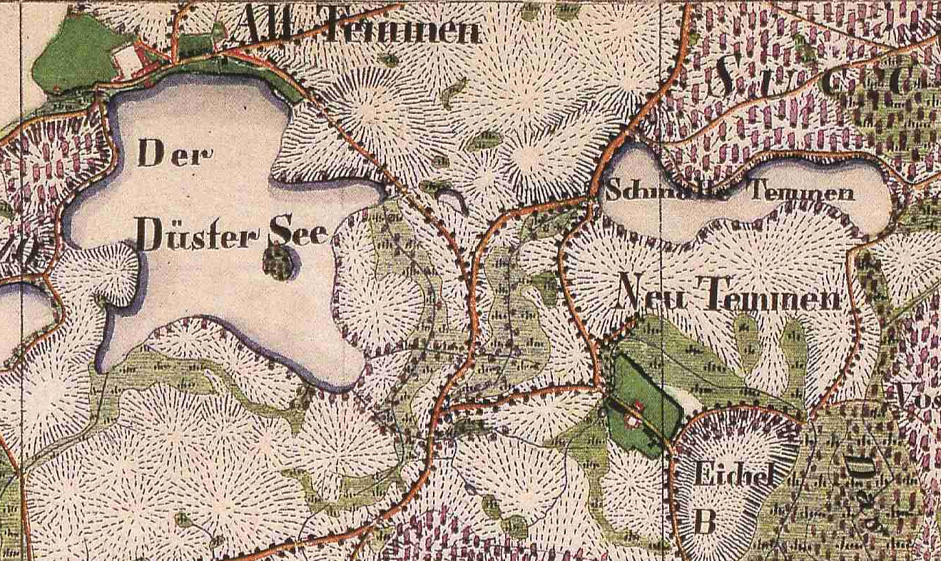 Alt-Temmen, Neu-Temmen, Gem. Temmen-Ringenwalde, Landkreis Uckermark, Brandenburg, Ausschnitt aus dem Urmesstischblatt 2948 Friedrichswalde von 1826